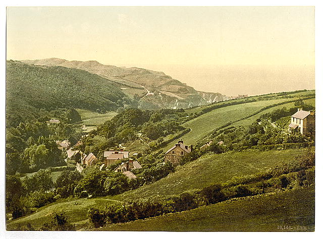 Landschaft von Devon, England (Kongressbibliothek) TITLE: [General view, Lee (Devon), England] CALL NUMBER: LOT 13415, no. 555 [item] [P&P] Find any corresponding online LOT(group) record REPRODUCTION NUMBER: LC-DIG-ppmsc-08542 (digital file from original) No known restrictions on publication. MEDIUM: 1 photomechanical print : photochrom, color. CREATED/PUBLISHED: [between ca. 1890 and ca. 1900]. NOTES: Title from the Detroit Publishing Co., Catalogue J--foreign section, Detroit, Mich. : Detroit Publishing Company, 1905. Print no. "10144". Forms part of: Views of England in the Photochrom print collection. FORMAT: Photochrom prints Color 1890-1900. PART OF: Views of England REPOSITORY: Library of Congress Prints and Photographs Division Washington, D.C. 20540 USA DIGITAL ID: (original) ppmsc 08542 CARD #: 2002696903